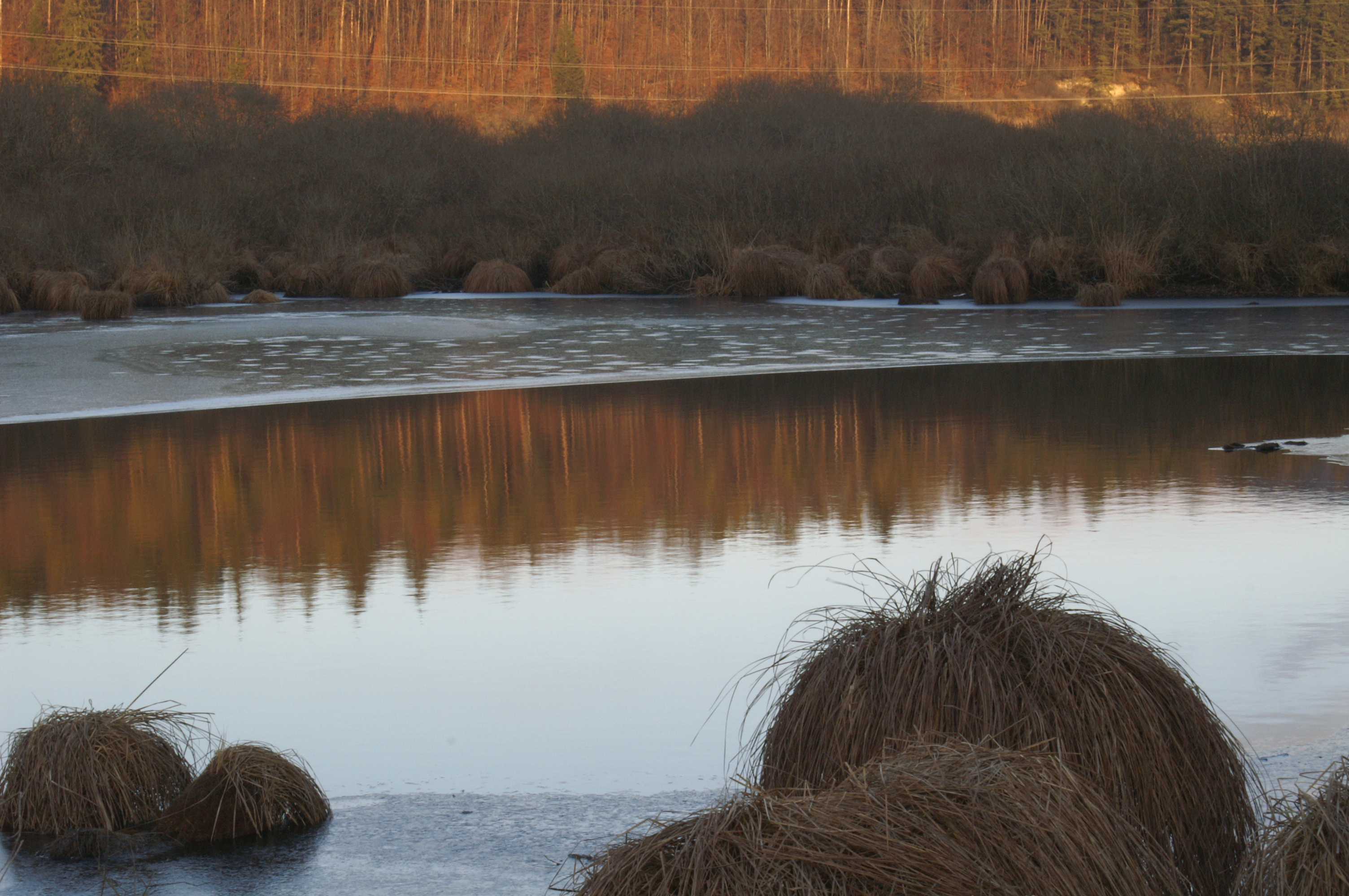 Naturschutzgebiet Schmiechener See; nördlicher Teil mit einer dünnen Eisschicht, der südliche Teil ist eisfrei